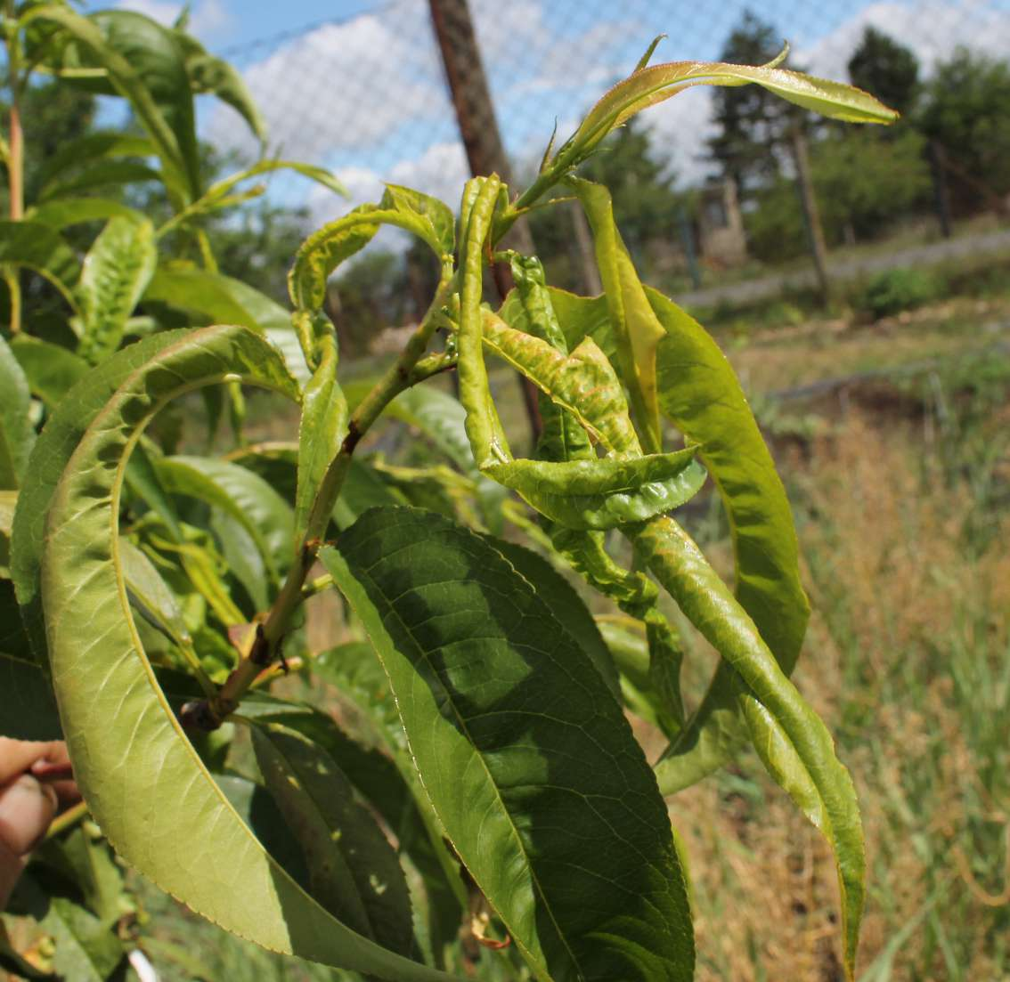 Kadeřavost broskvoně je choroba broskvoně způsobená houbou palcatka broskvoňová (Taphrina deformans) Brno Komín